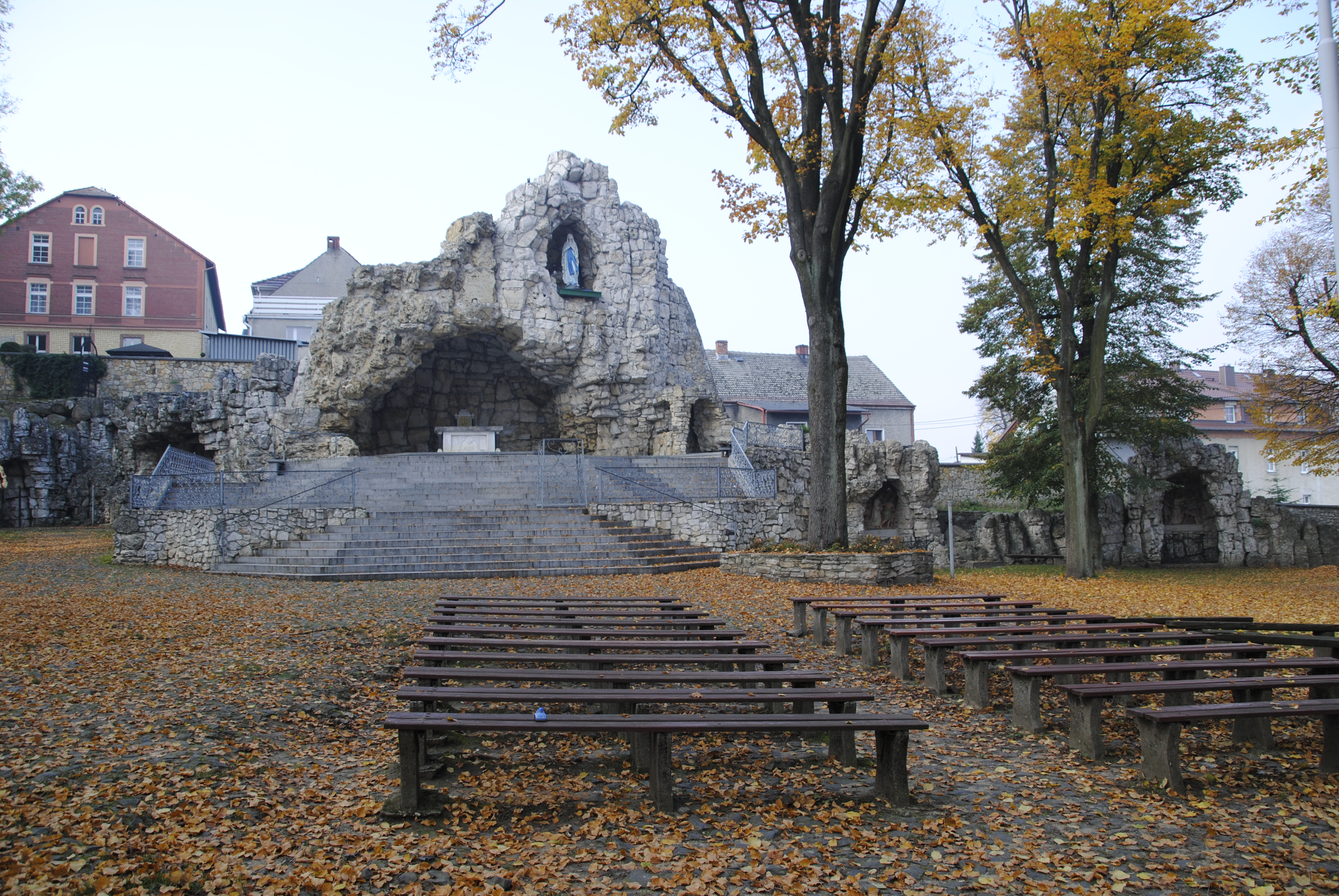 Lourdes Grotte am St. Annaberg in Oberschlesien